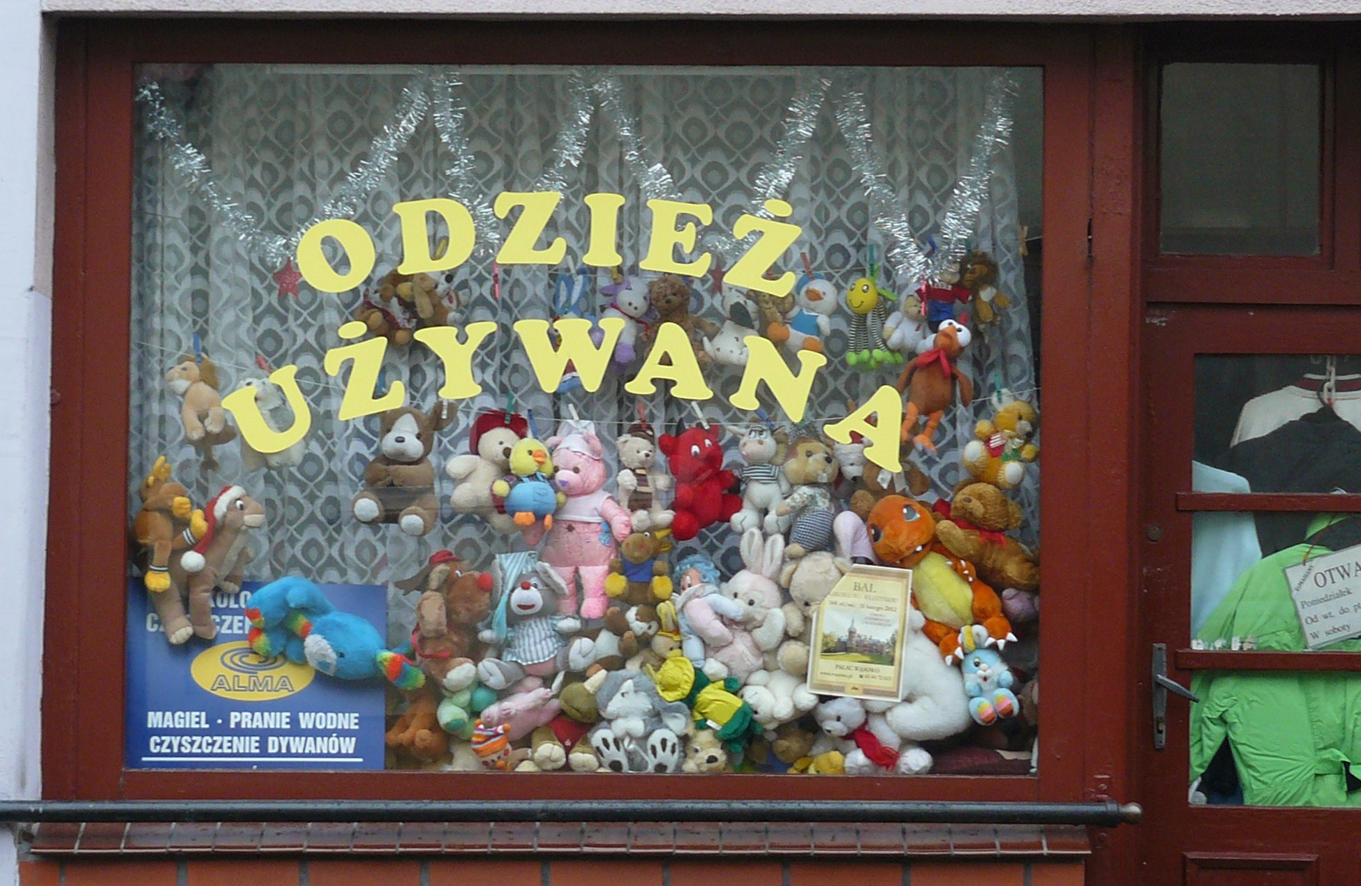 Pniewy, sklep z odzieżą używaną.